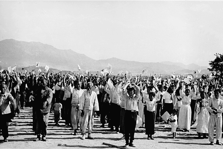 촬영일 : 1954년 04월 12일 촬영장소 : 대한민국 참석자 : 미상 관련내용 : 제3군단 지구 시찰에 나선 이승만 대통령을 환영하는 인파